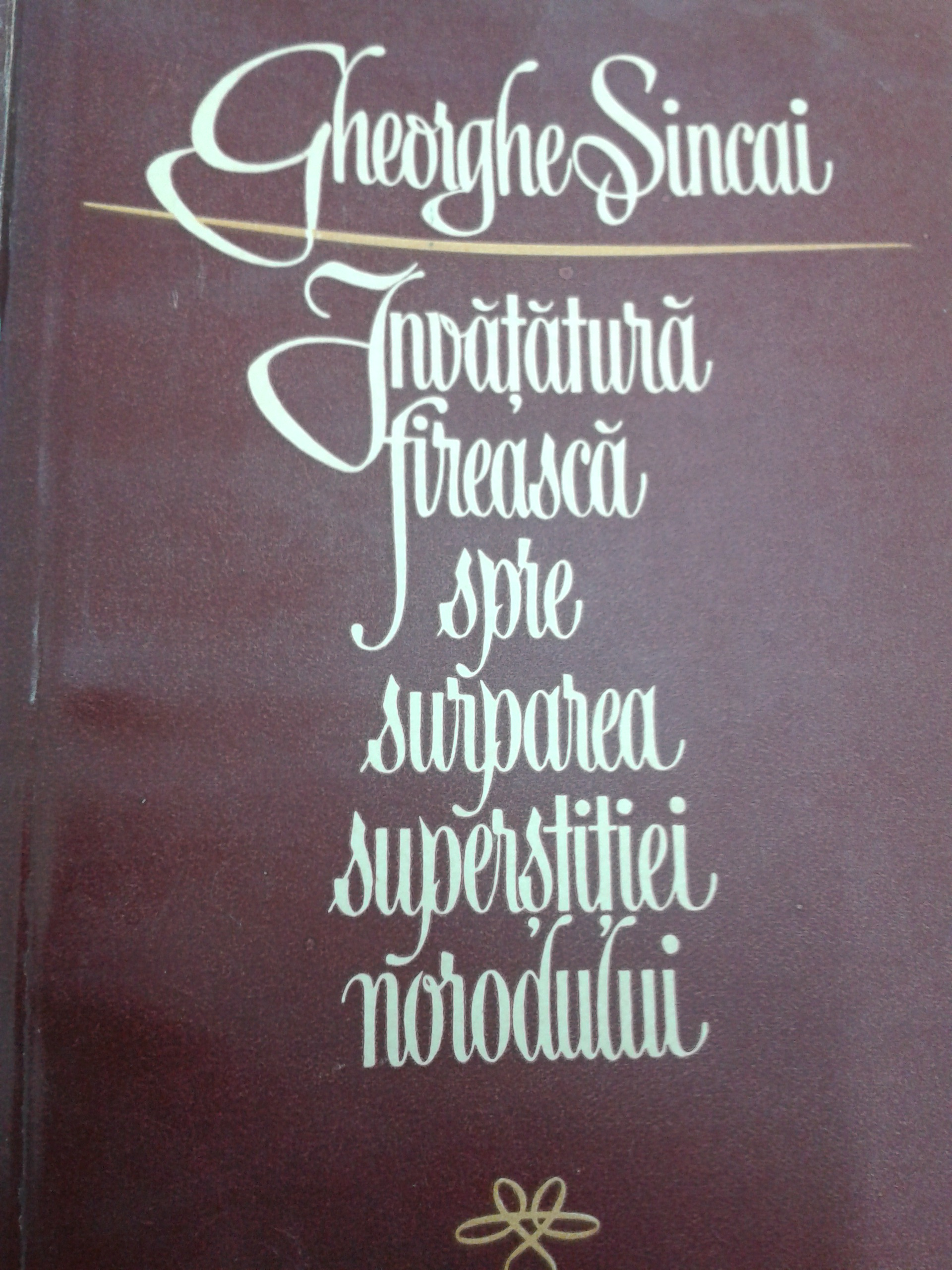 Invatatura fireasca spre surparea superstitiei norodului.